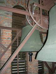 Die Glocken der Georgskirche (2012)